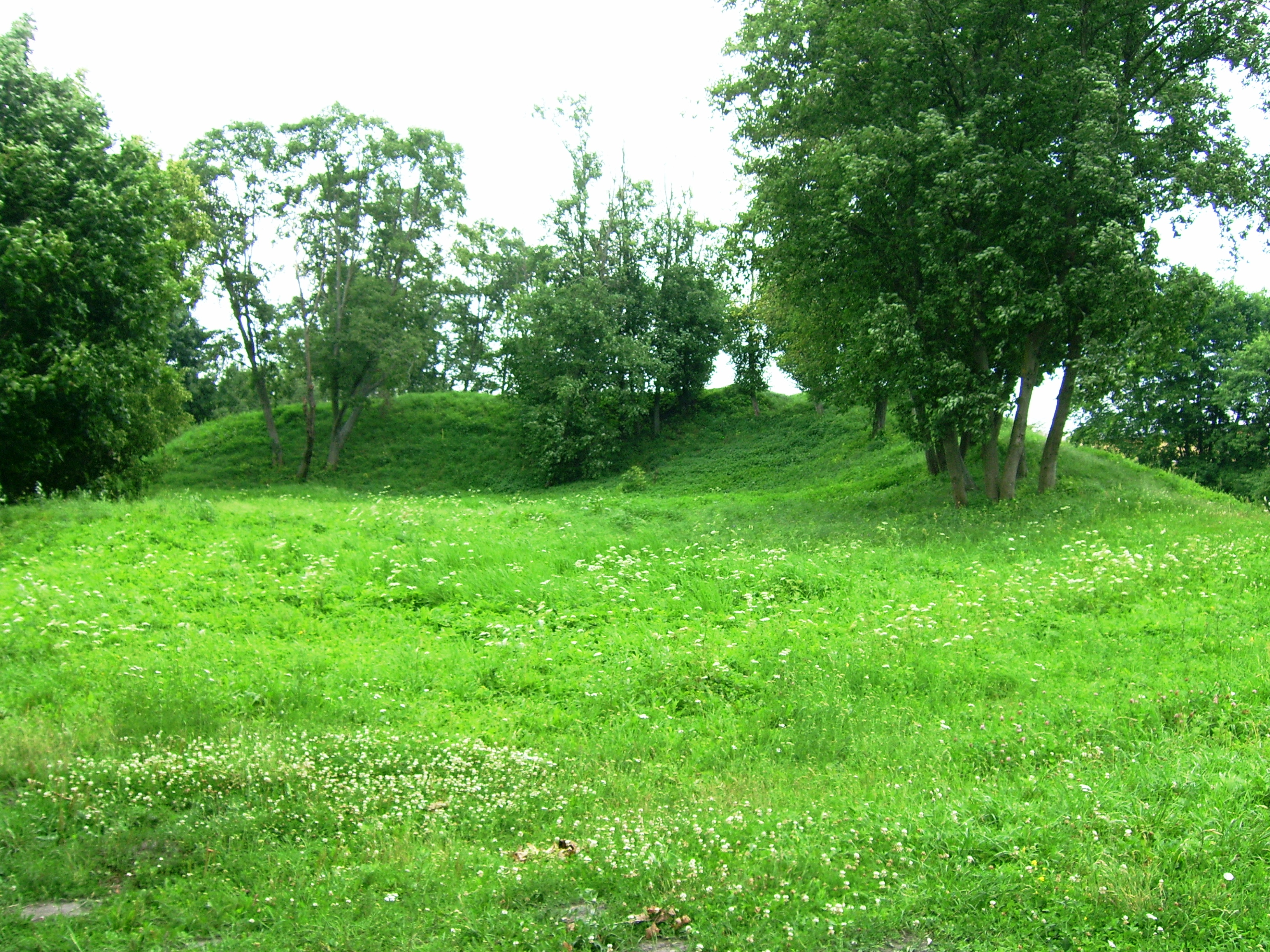 Bišpilio piliakalnis